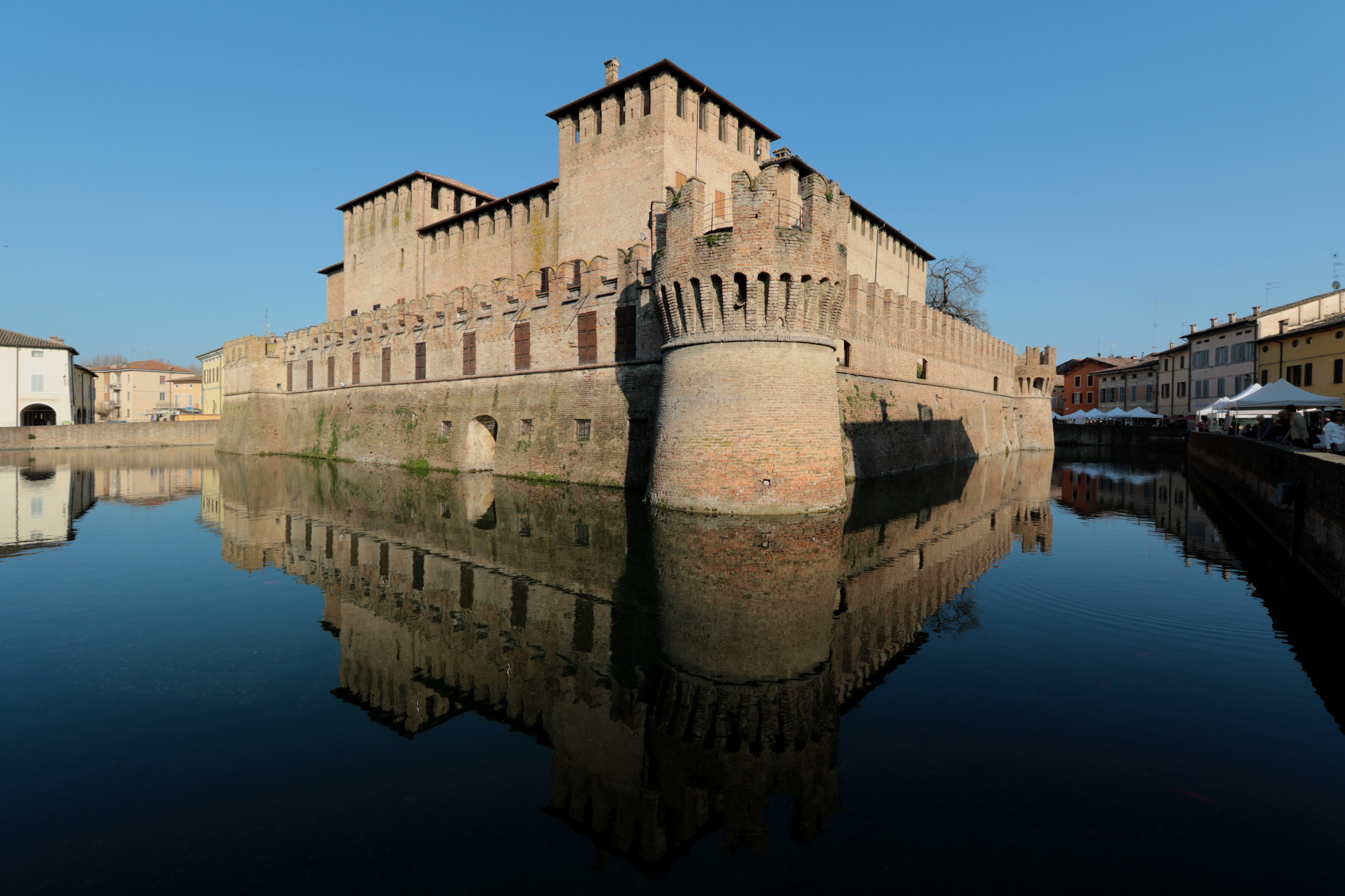 Rocca Sanvitale - Fontanellato